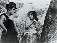 fotografía de la película His Prehistoric Past de 1914.